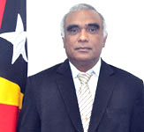 Pedro dos Mártires da Costa, Abgeordneter aus Osttimor